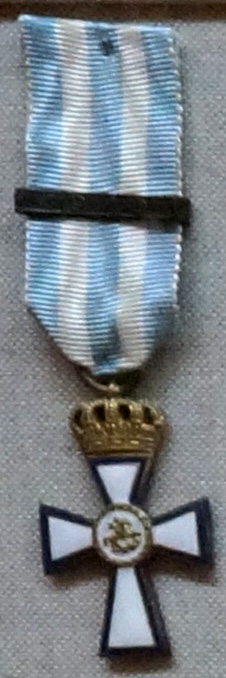 présenté au musée de la guerre de Salonique.